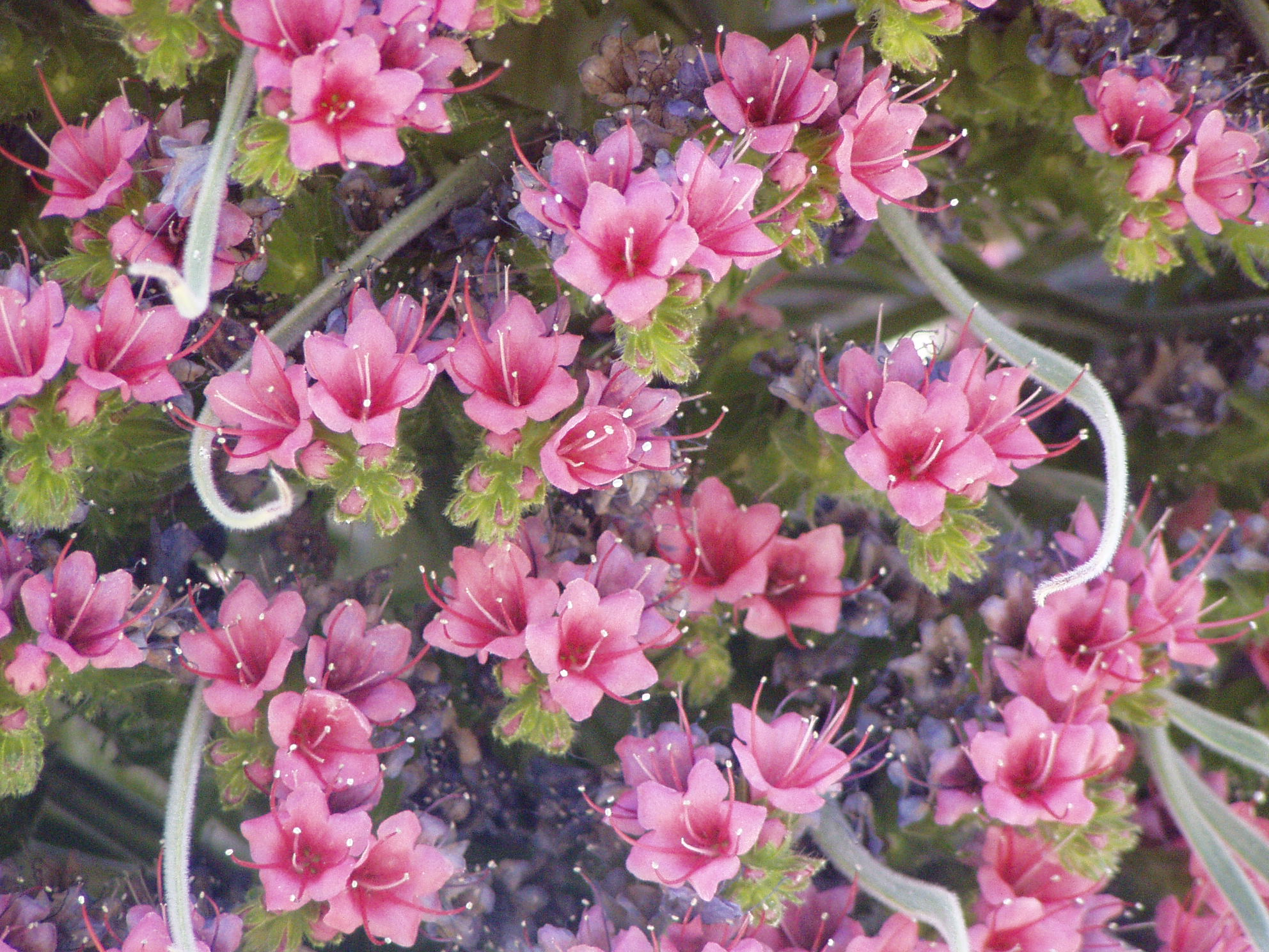 Detalle de la flor del tajinaste rojo. Parque Nacional del Teide. Tenerife. Canarias.